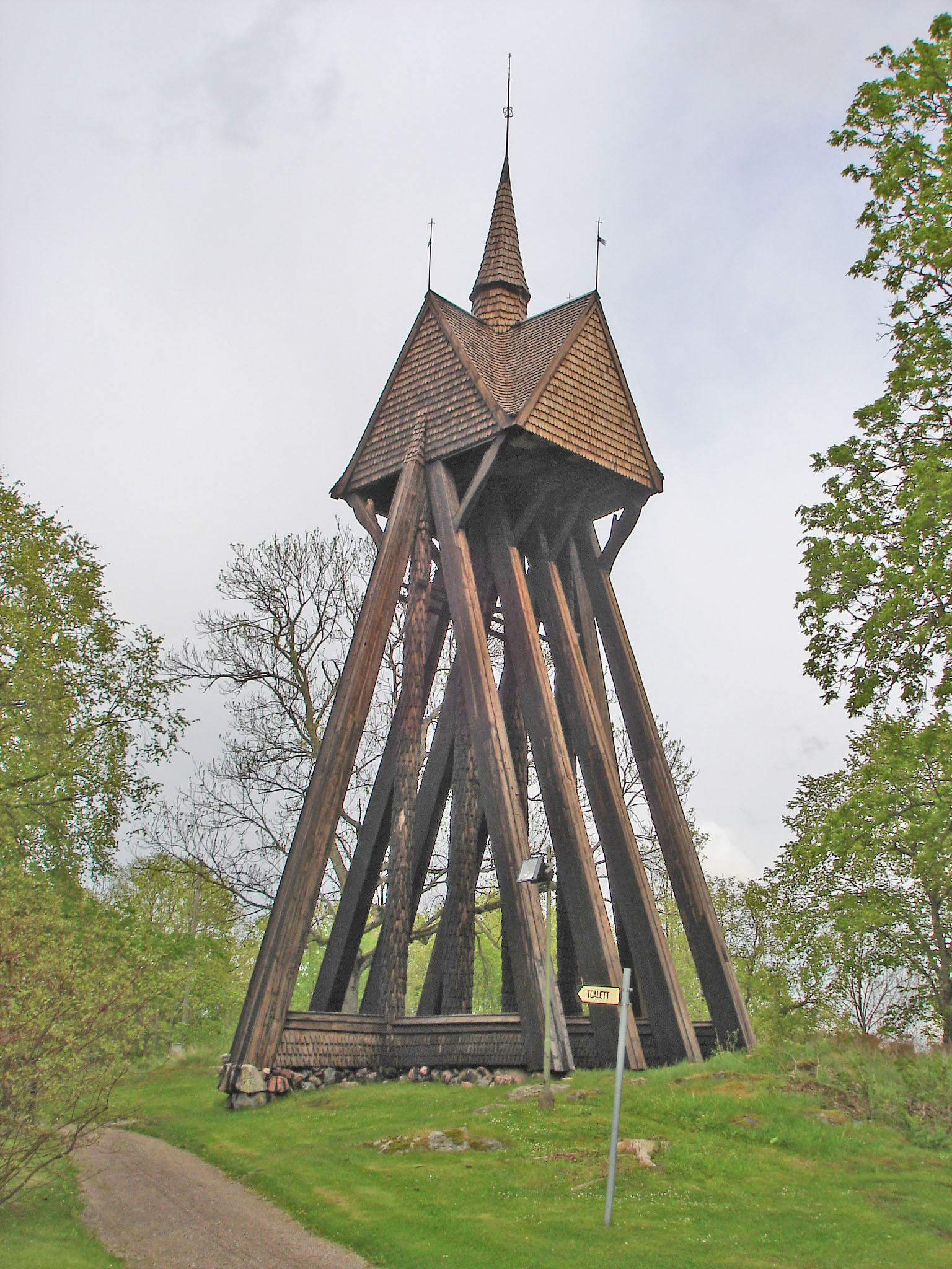 Fotat av församlingsmedlem (tompen0000), 2006